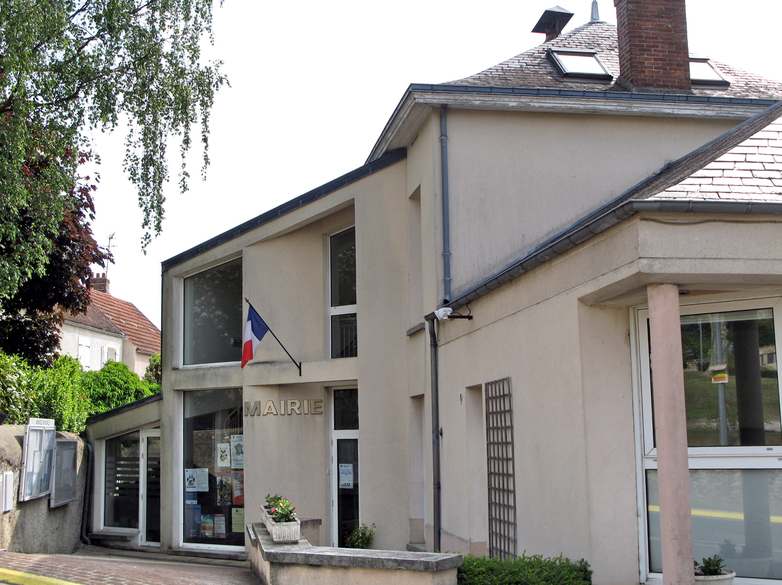 Mairie de Breux-Jouy (Essonne)